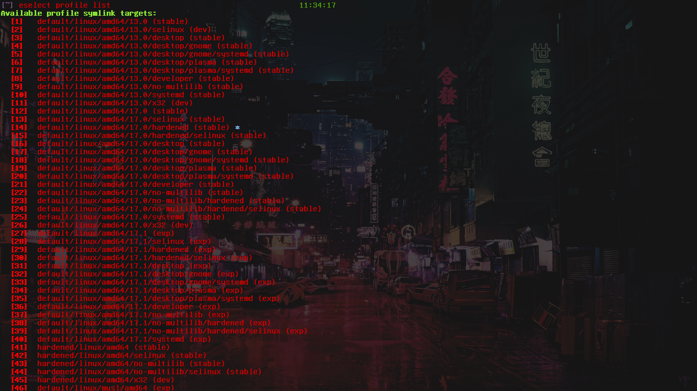 Parte della lista dei profili disponibili su Gentoo Linux, mostrati utilizzando il comando eselect profile list